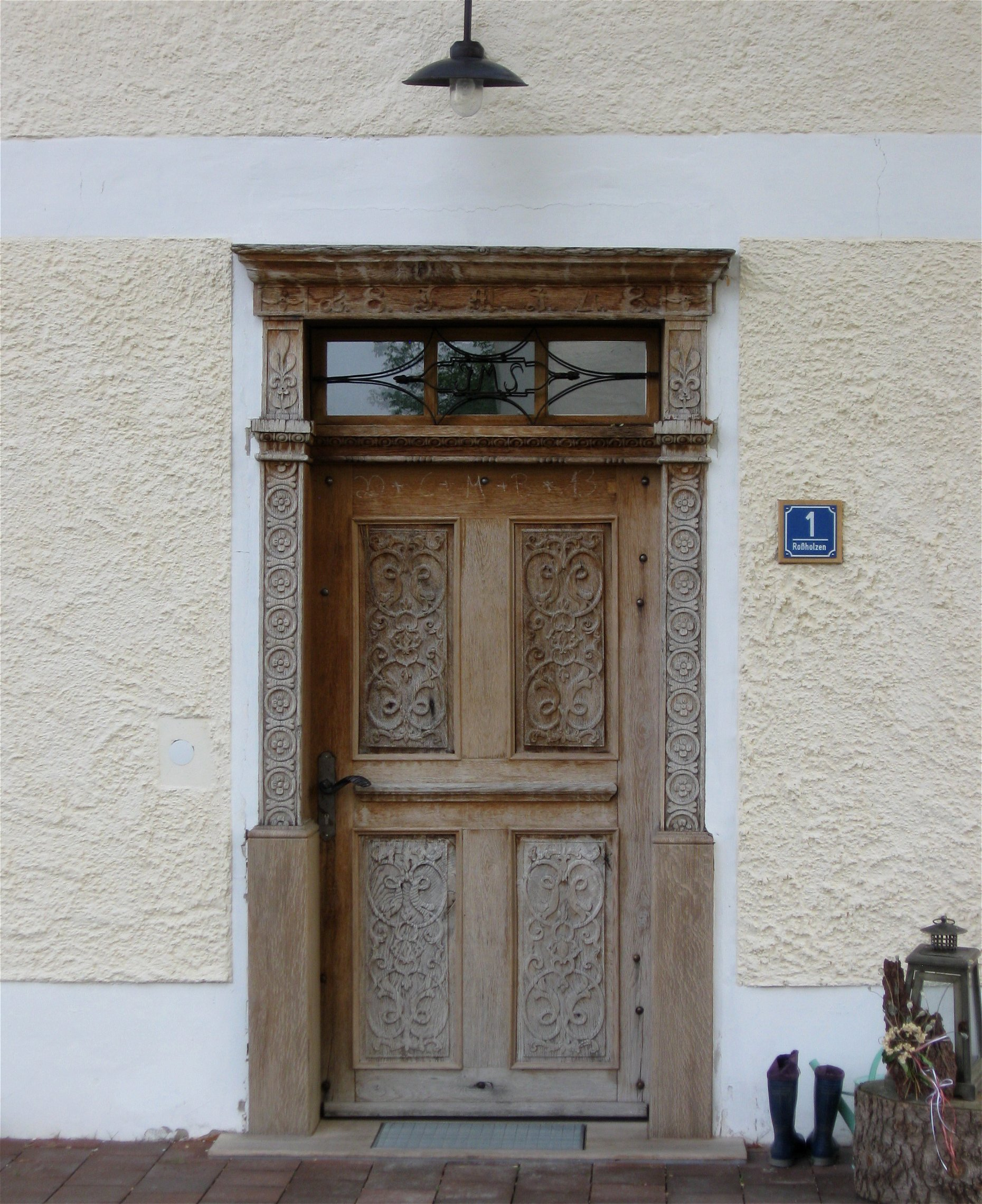 Roßholzen Nr. 1; Bauernhaus mit Giebellaube und geschnitztem Türstock, bez. 1848.